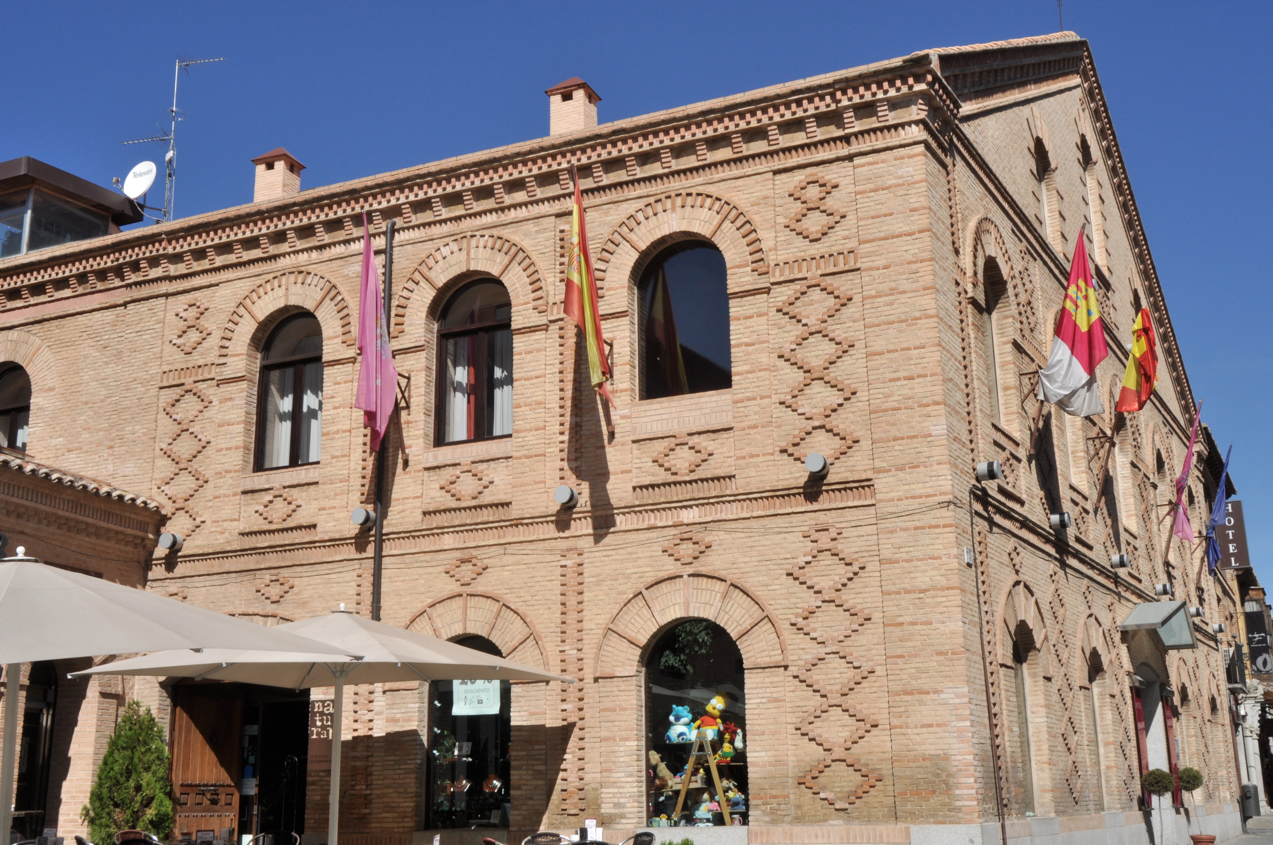 Toledo Capital - 149